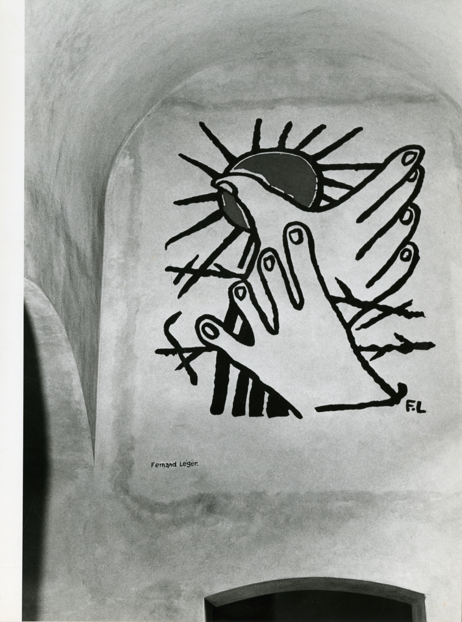 Carpi. Museo Monumento al Deportato politico e razziale. Graffito su bozzetto di C. Cagli e F. Léger; reperti, materiali e fotografie documentano la vita dei prigionieri nei campi, raccolti e ordinati da Steiner. Sala dei nomi. Servizio fotografico : Carpi, 1973 / Paolo Monti. - Stampe: 13 : Positivo b/n, gelatina bromuro d'argento/ carta, 24x30. - ((Al verso delle stampe manoscritti i numeri dei negativi corrispondenti (formato 35 mm) con indicazione del fotogramma: 2436/26, 2436/32, 2438/6, 2438/24, 2438/25, 2438/26, 2439/4, 2439/13, 2439/15, 2439/20, 2441/19, 2441/25, 2441/35; iscrizioni didascaliche manoscritte a matita; timbro a inchiostro con copyright (Corso Sempione - Milano). - Sul coperchio della scatola iscrizione didascalica manoscritta a pennarello nero: "Archit. Moderna/ Musei". - Il museo di Carpi è stato progettato dallo studio BBPR in collaborazione con Giuseppe Lanzani e Renato Guttuso; è stato inaugurato il 14 ottobre 1973. - Occasione: Documentazione del nuovo Museo progettato dallo studio BBPR e per la pubblicazione: Orlandi Piero, "Museo monumento al deportato politico e razziale nei campi di sterminio nazisti: Carpi, Castello dei Pio", Sesto San Giovanni, G. Beveresco. - Fonte: Fattura di Paolo Monti: IV. Commesse/ Fattura (1972/11/14), presso Archivio Paolo Monti. - Fonte: Quaderno di Paolo Monti: Leica 1501-3000 Controllo numerazione (1950-1978), presso Archivio Paolo Monti. - Fonte: Monografia di Orlandi, Piero: Museo monumento al deportato politico e razziale nei campi di sterminio nazisti: Carpi, Castello dei Pio, Sesto San Giovanni, G. Beveresco (1973), presso Archivio Paolo Monti